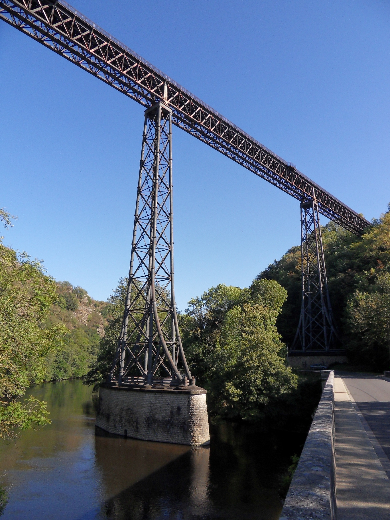 Viaduc de Rouzat, (Inscrit, 1965) .